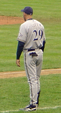 Dale Sveum